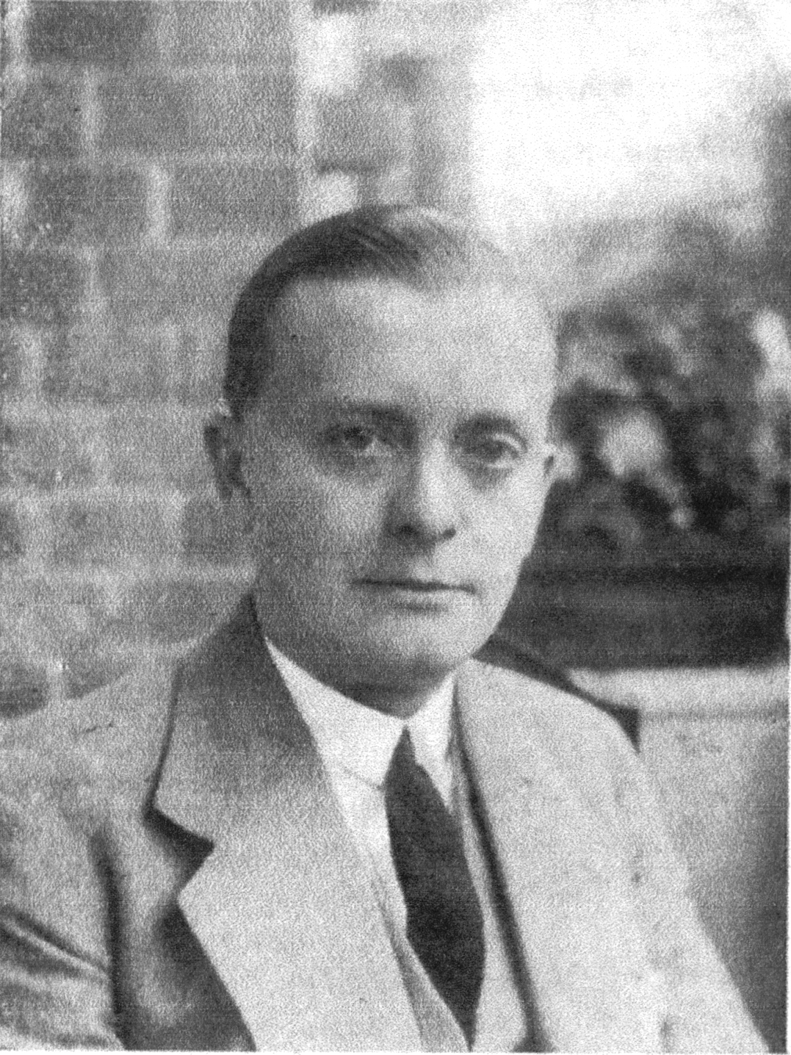 Mihály Dénes